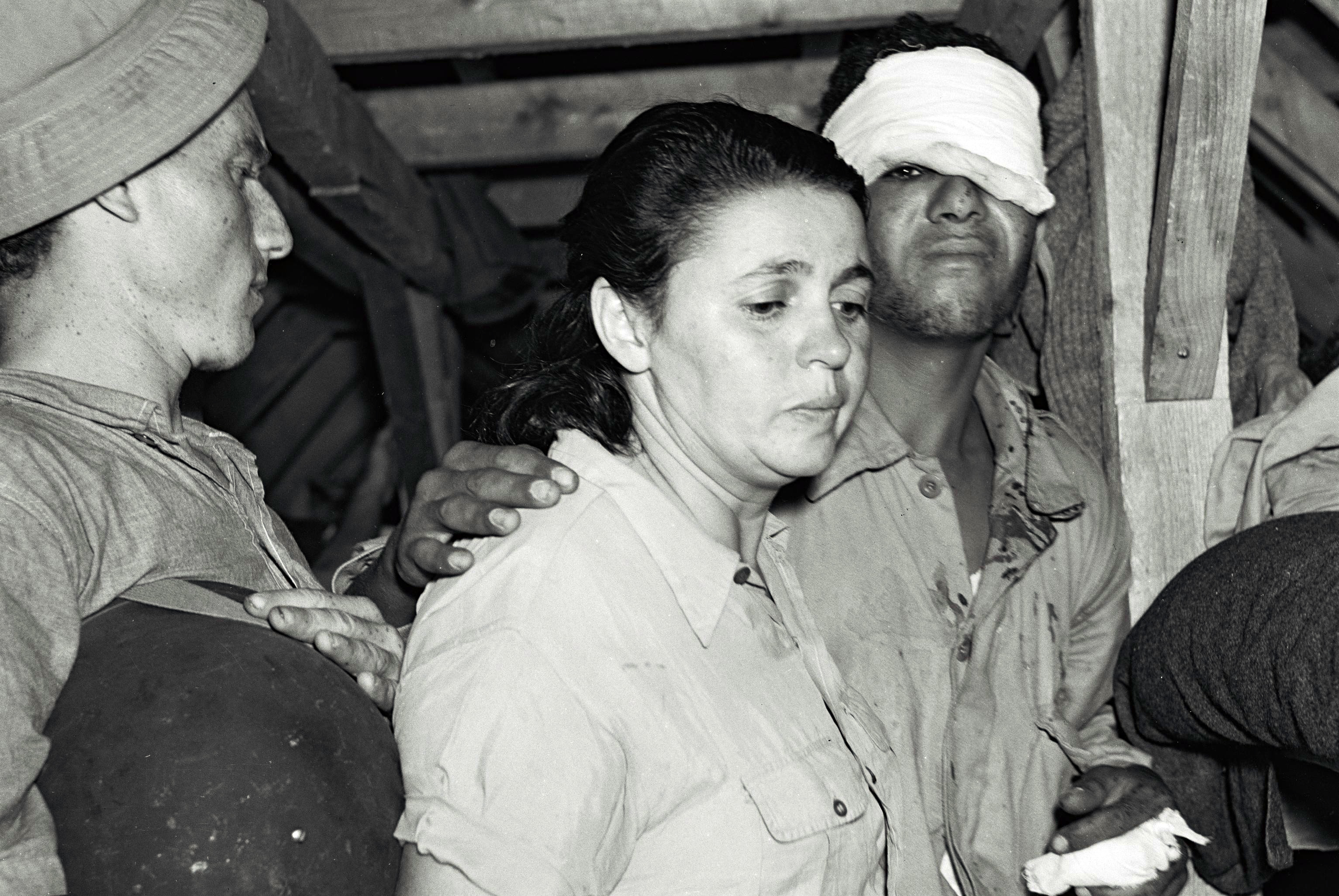 The war of Independence. A WOUNDED HAGANA MEMBER BEING TAKEN TO A FIRST AID STATION AT KIBBUTZ YAD MORDECHAI (17/5/1948). מלחמת העצמאות. בצילום, חברת הגנה פצועה נלקחת לתחנת העזרה הראשונה בקיבוץ יד מרדכי.